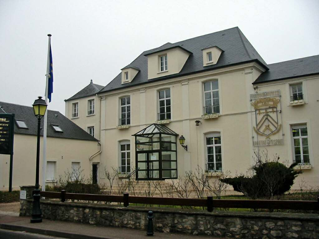 Mairie de Magnanville (Yvelines) Photo JH Mora, février 2006 Licensing Magnanville Catégorie:Image de Magnanville